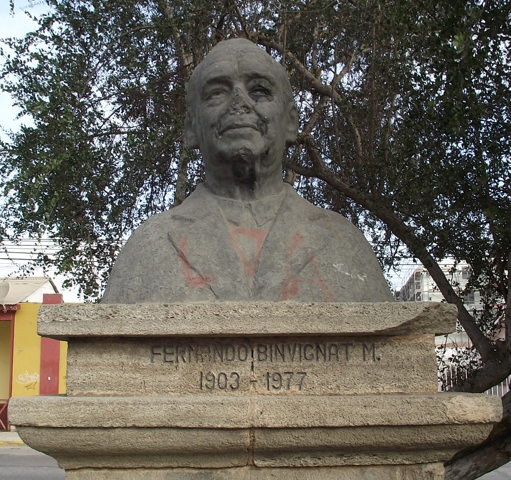 Busto de Fernando Binvignat en el Paseo de los Poetas de la Avenida Francisco de Aguirre, La Serena, Chile.